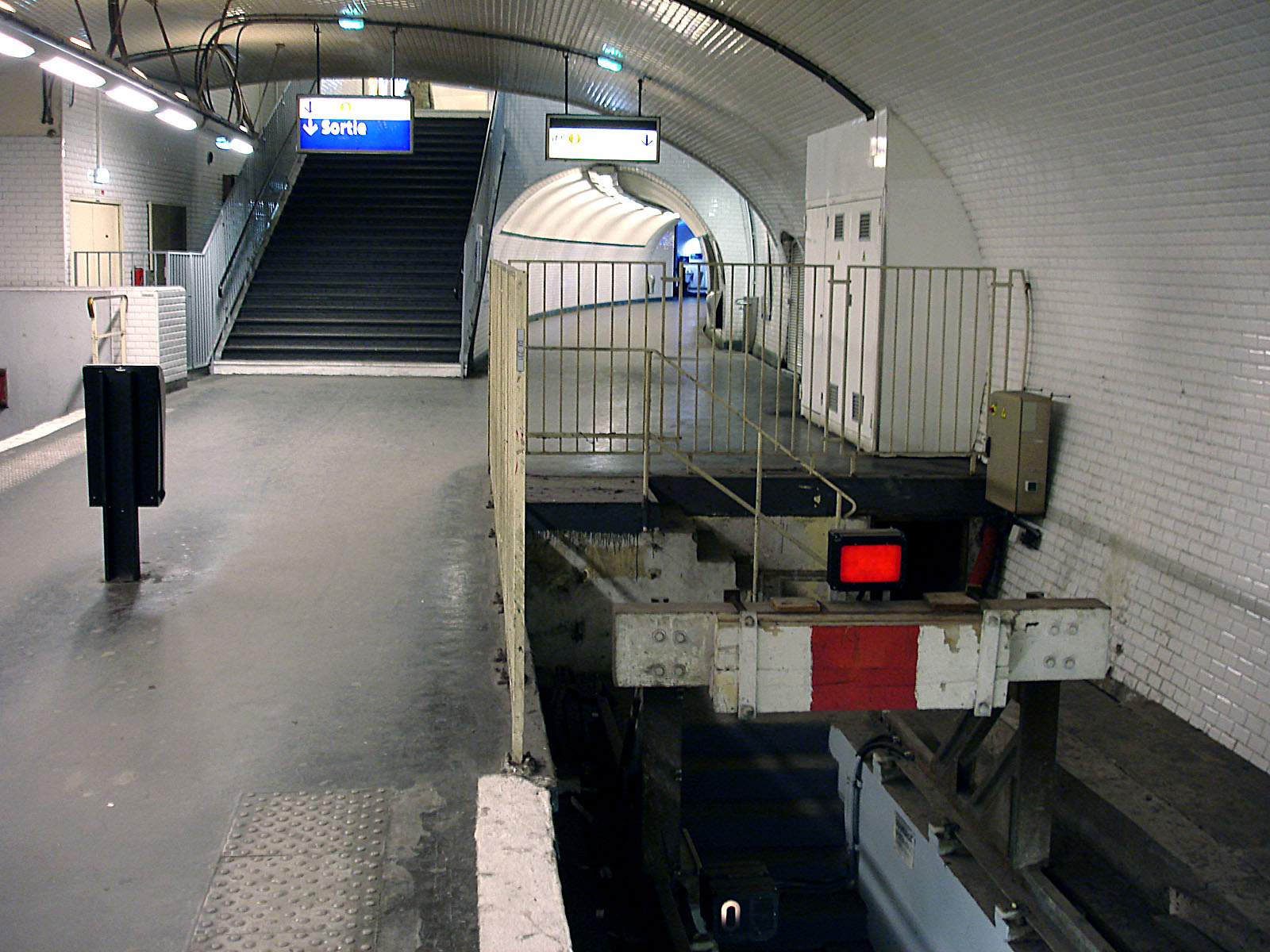 Butoir à la station Gambetta de la ligne 3 bis du métro de Paris, France.